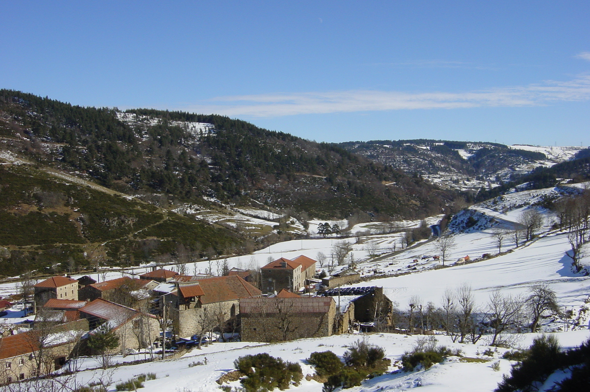 Croisances en Lozère sous la neige